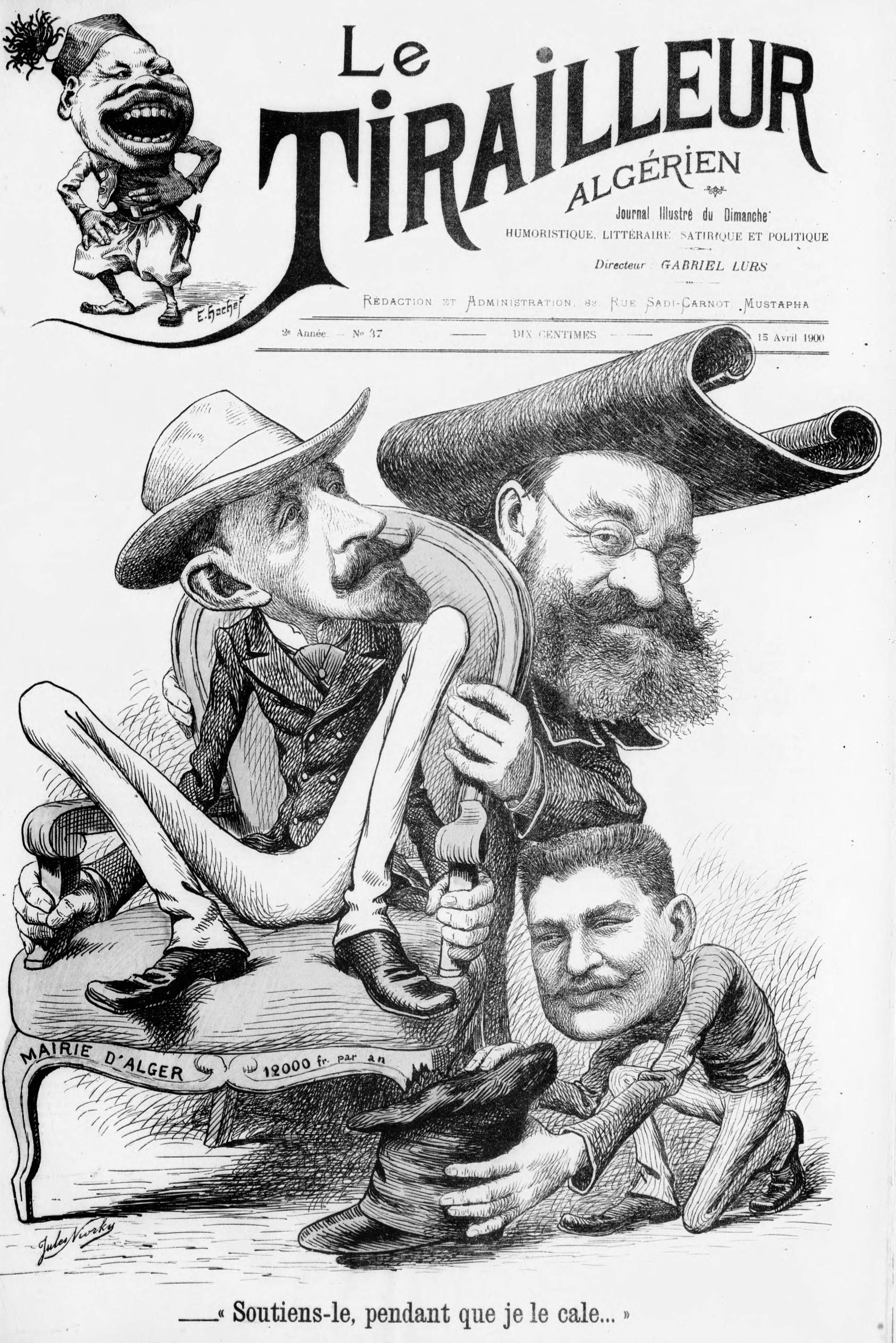 Caricature à propos des élections municipales du 6 mai 1900 à Alger : Voinot, maire sortant, est soutenu par le député Drumont et l'ancien maire Max Régis.